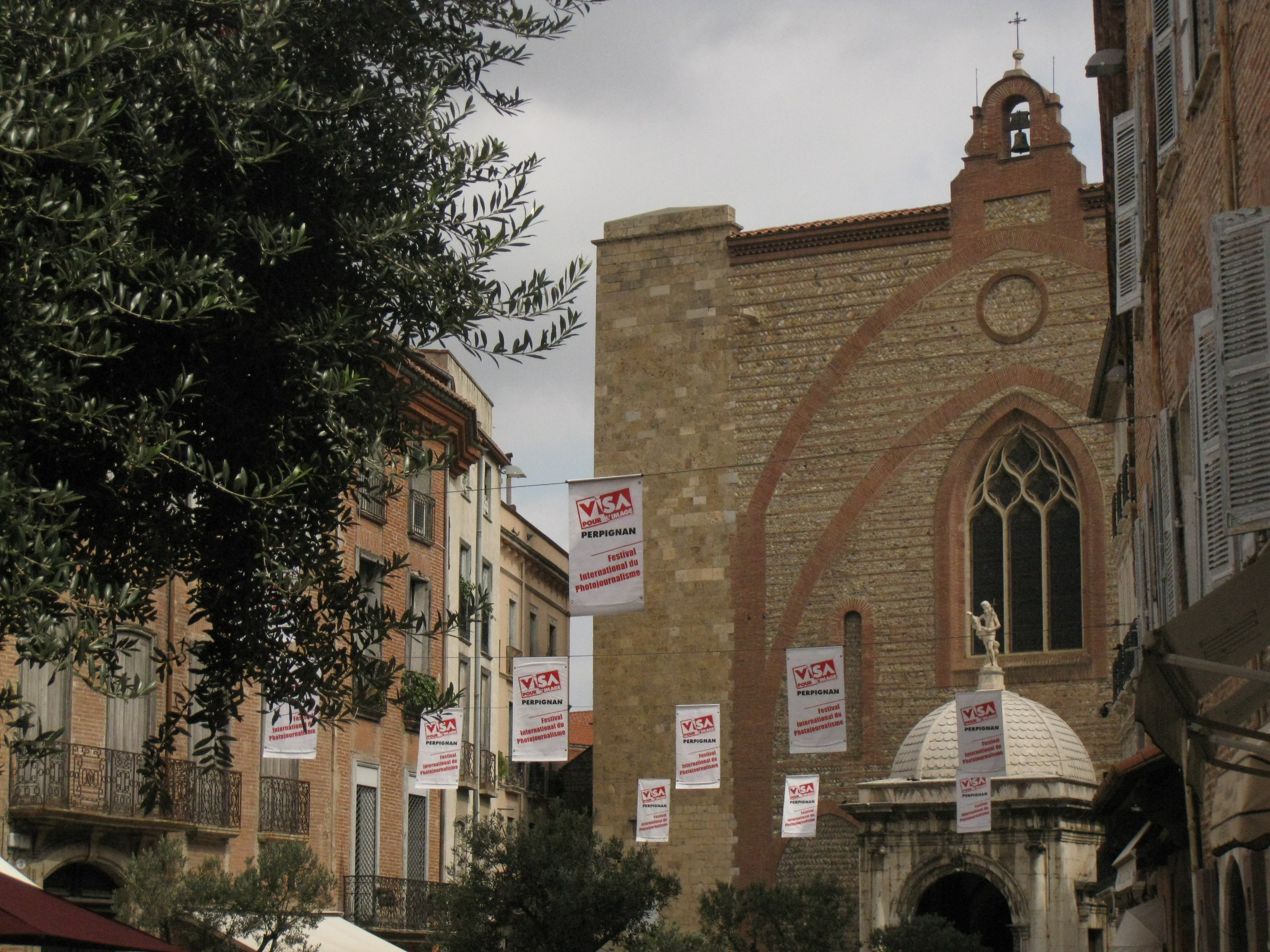 Catedral de Perpinyà, detall de la façana des de la plaça Gambetta, amb cartells commemoratius del certamen de fotoperiodisme Visa pour l'Image .